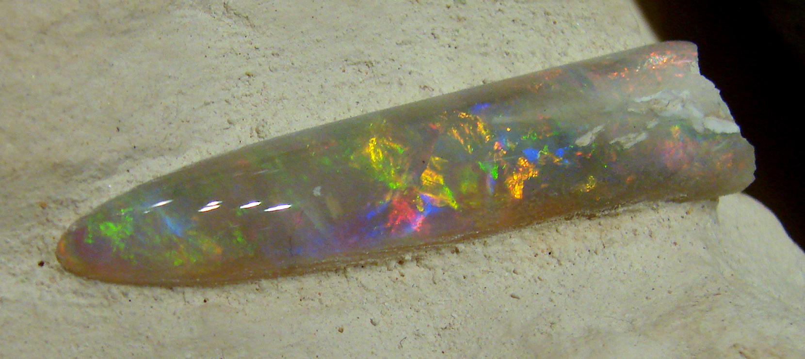 Belemnite opalisée, crétacé supérieur, 95 millions d'années, provenance: Coober Pedy, Australie.